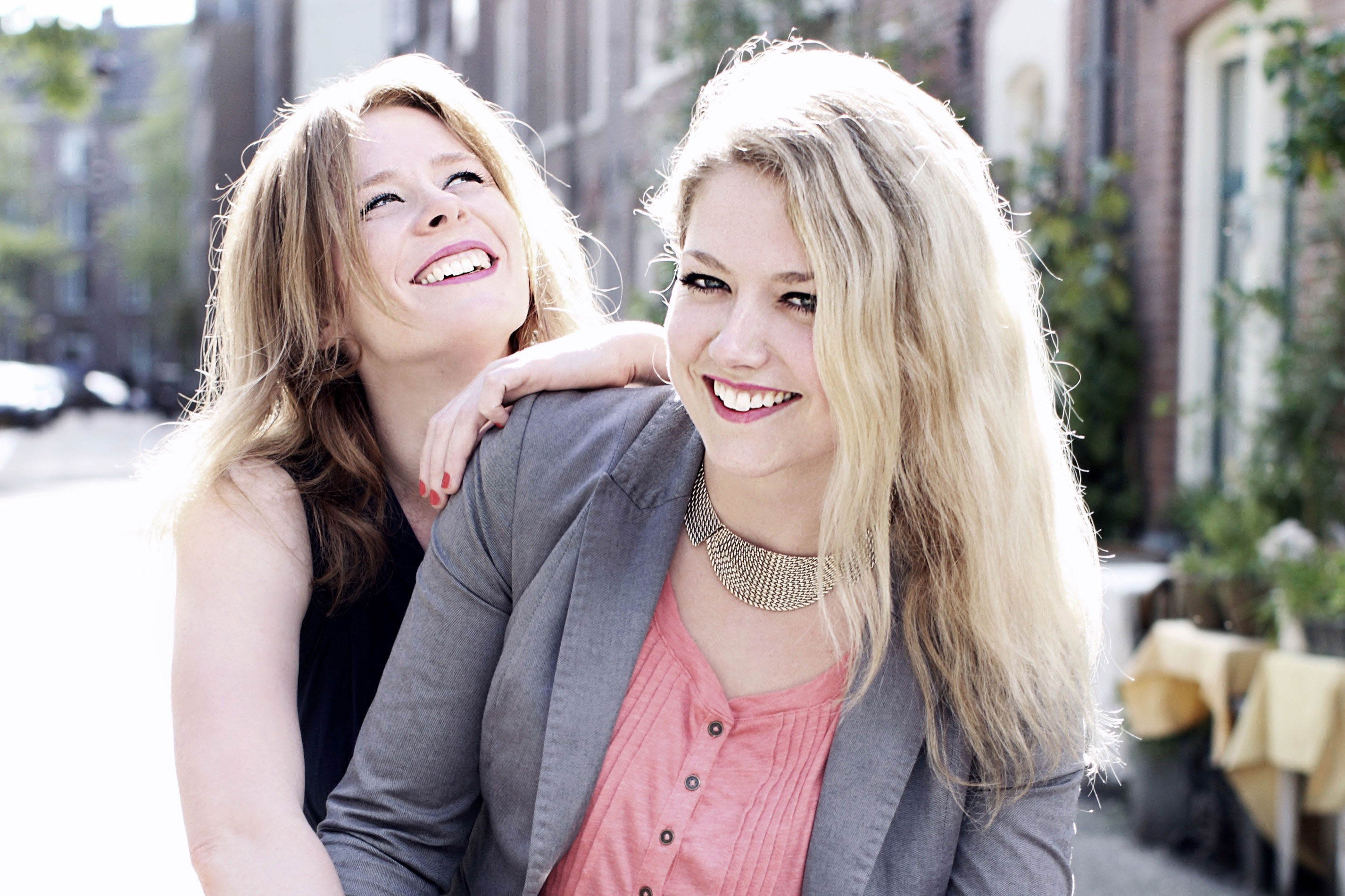 Absurdistisch muzikaal cabaretduo Yentl en de Boer. (Christine de Boer, links. Yentl Schieman, rechts).